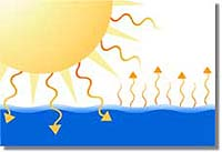 Evaporación del agua en los océanos Imagen obtenida de